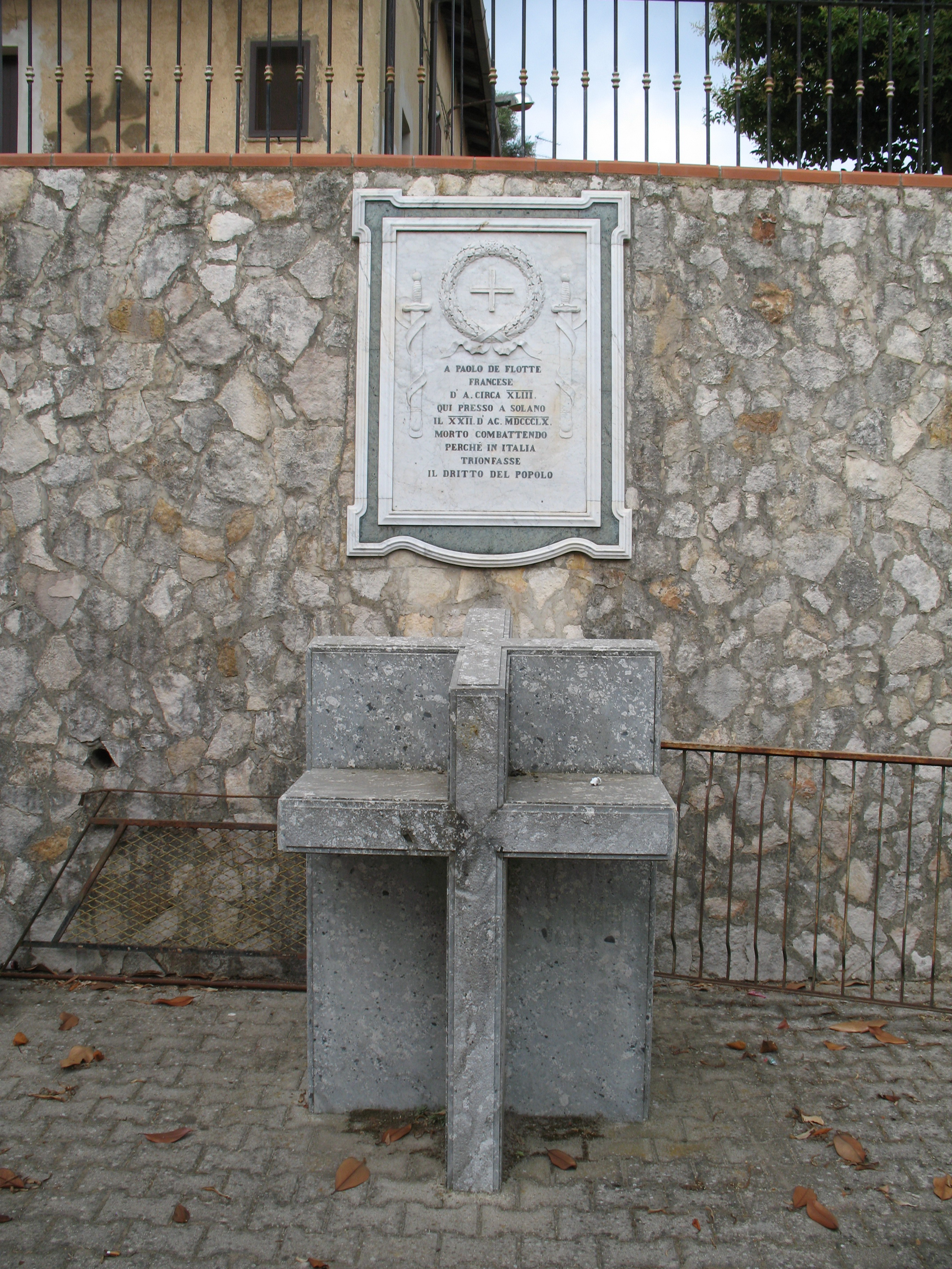 Solano inferiore, monumento dedicato a Paolo De Flotte.